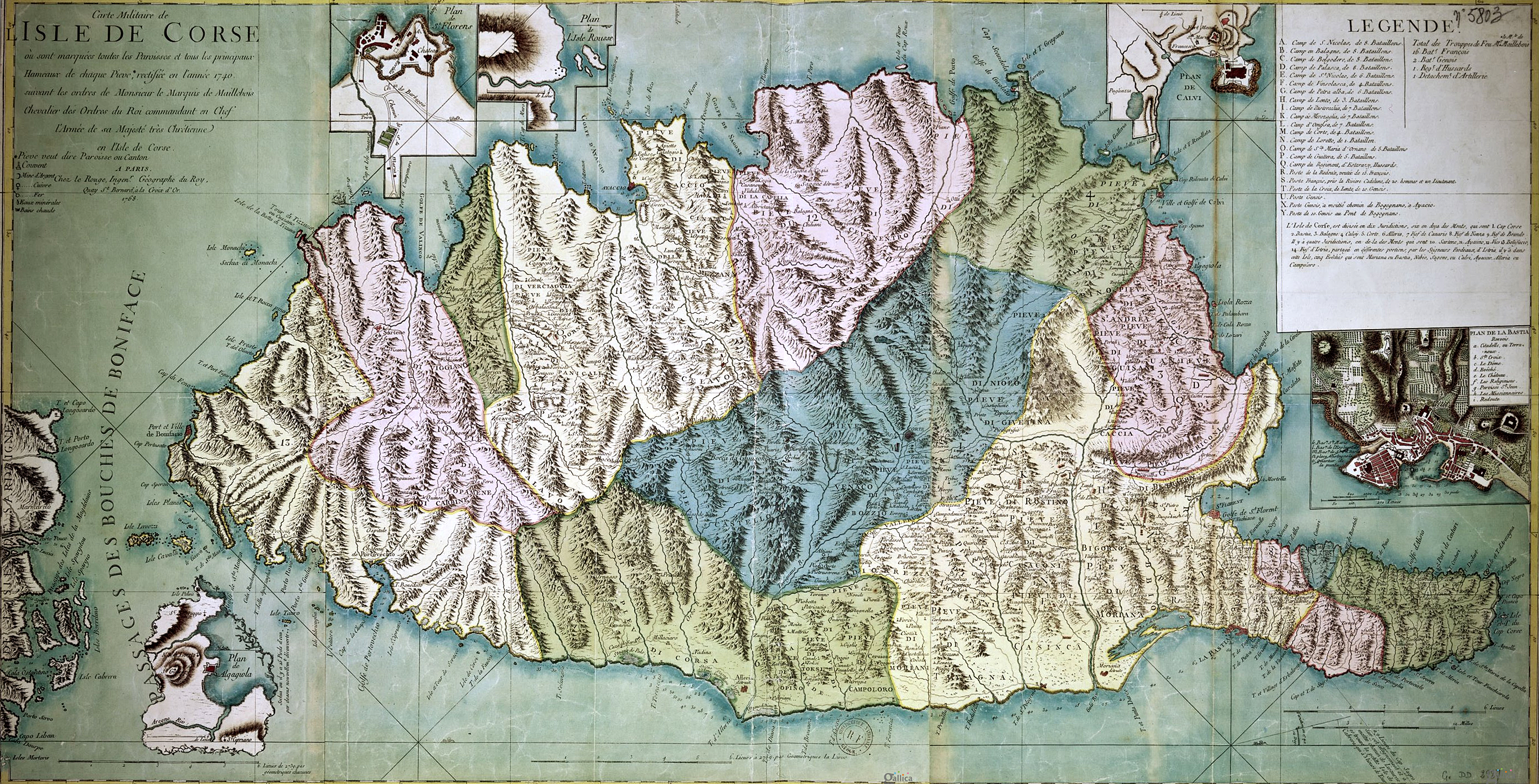 Carte militaire de l'Isle de Corse où sont marquées toutes les paroisses et tous les principaux hameaux de chaque pieve en 1740